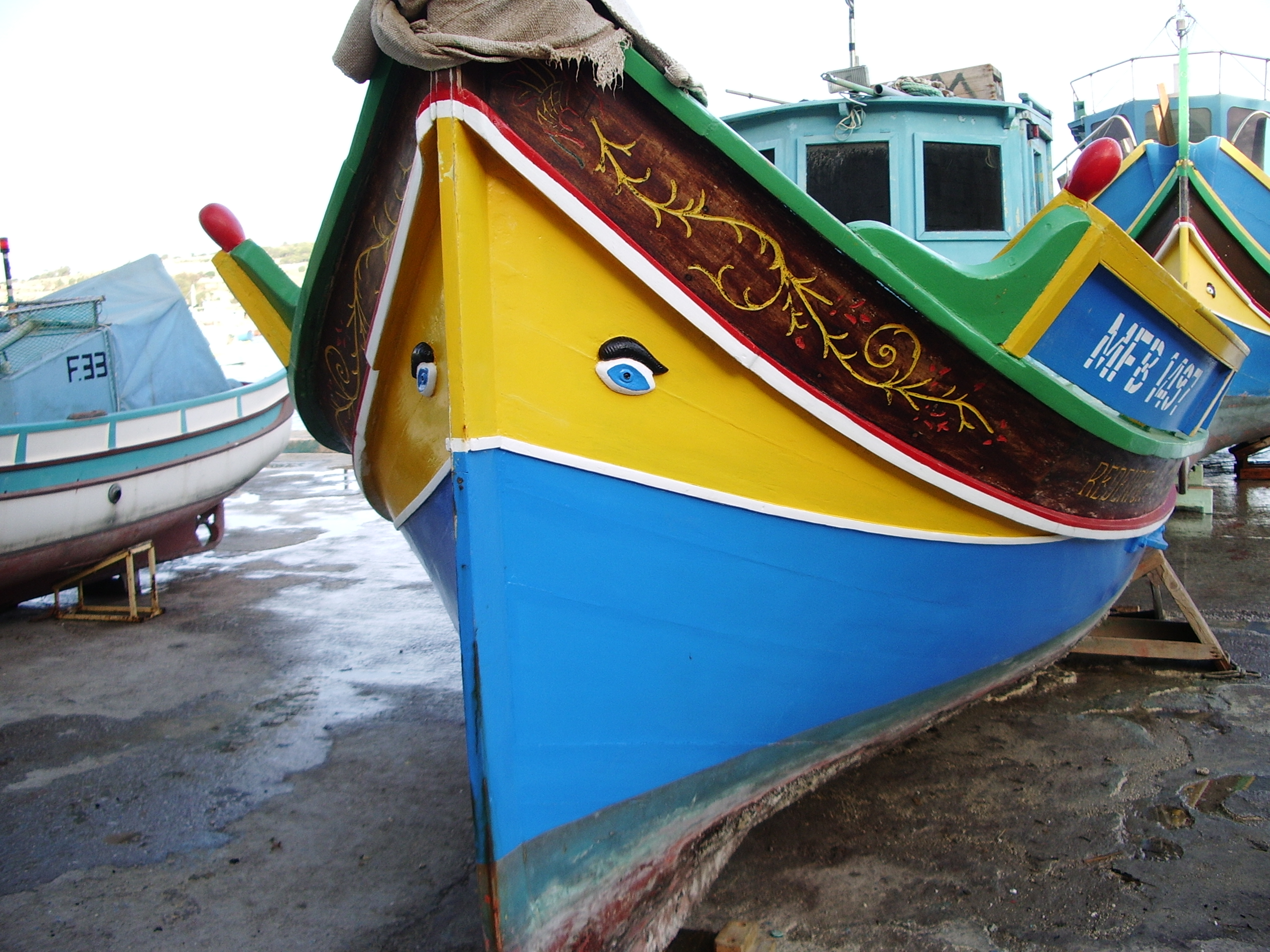 Luzzu. Imbarcazione tipica